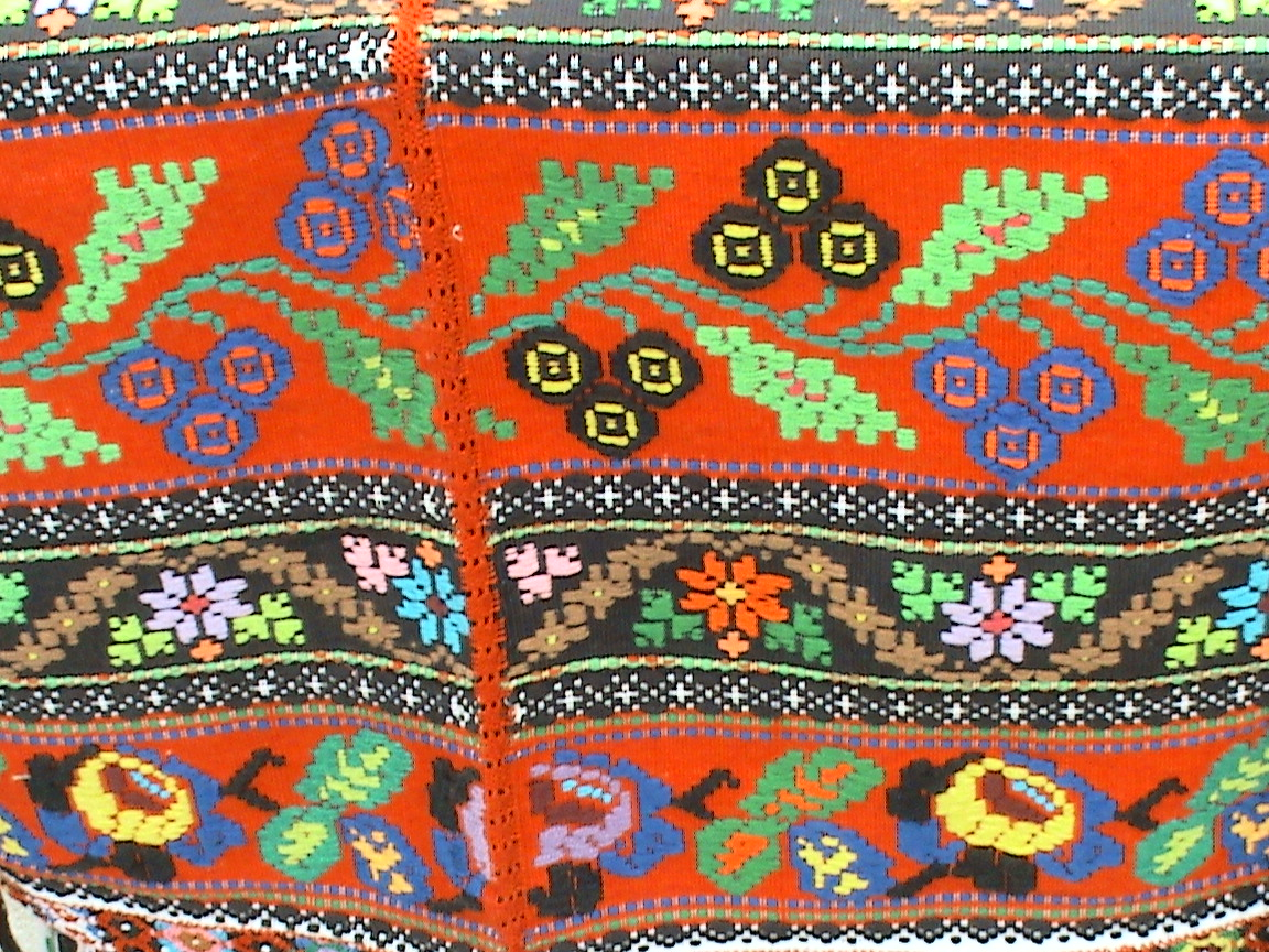 Faţă de masă tradiţională din Racoviţa, Sibiu.